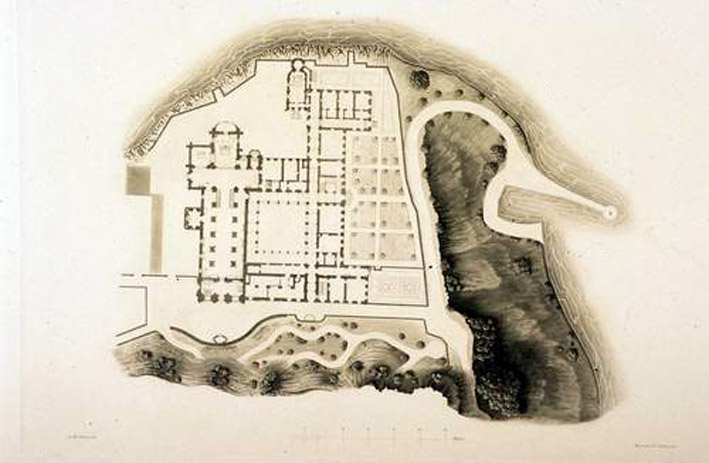 Plan de l'Abbaye d'Hautecombe réalisé en 1844 selon les plans de restauration d'Ernesto Melano